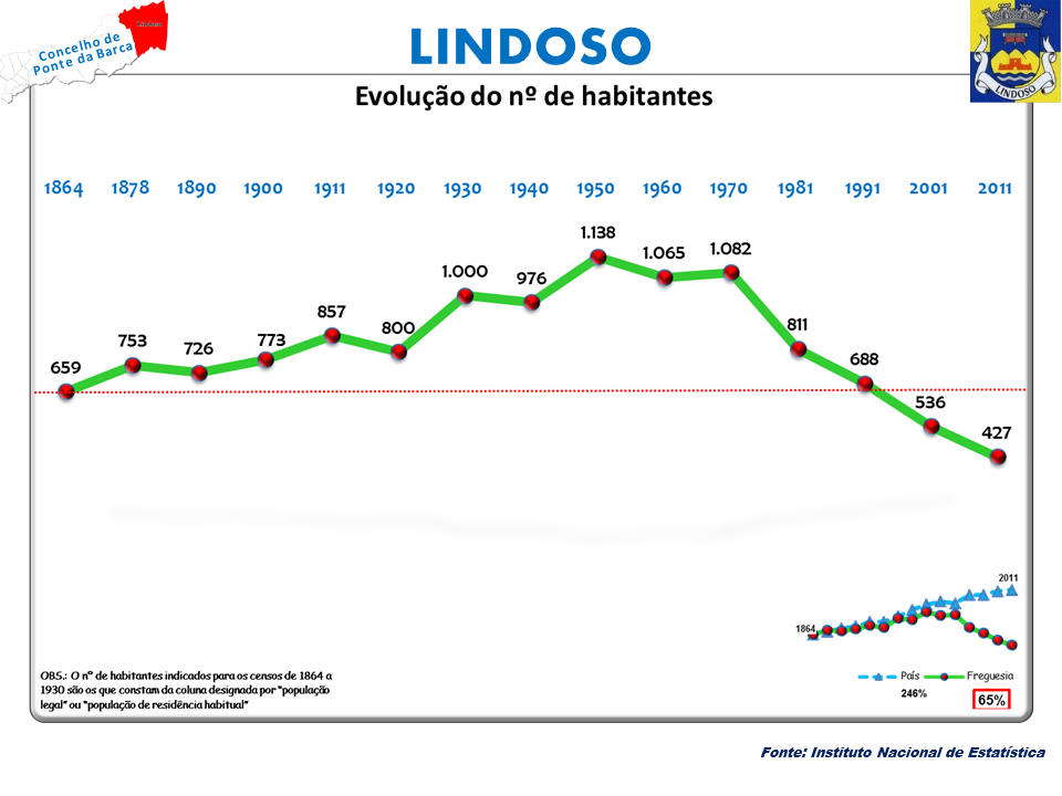 Censos 1864/2011